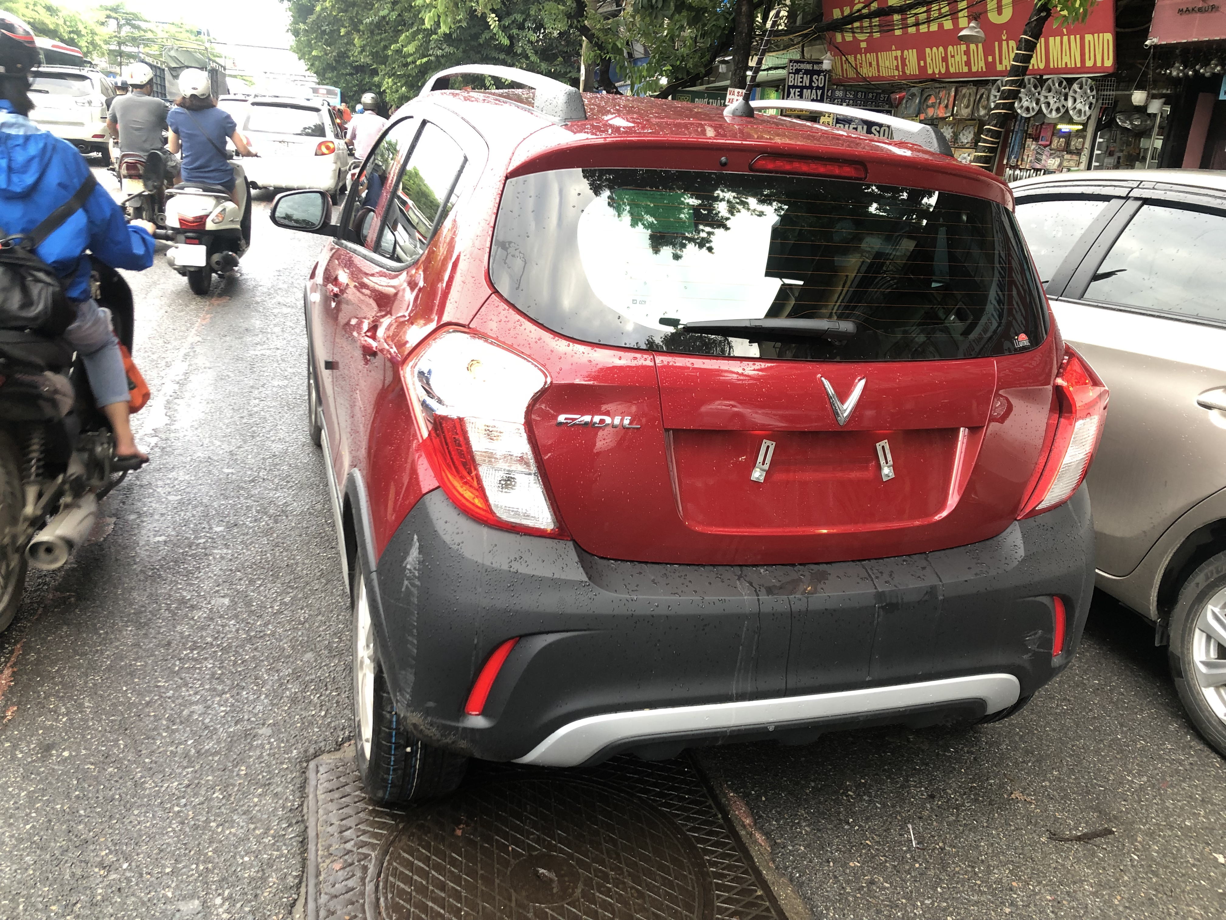 Xe VinFast Fadil màu đỏ trên phố Trần Nhật Duật, Hà Nội